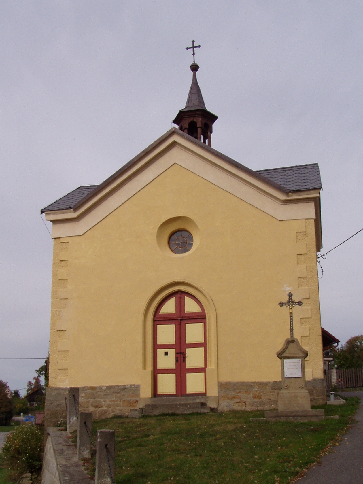 Kaple Panny Marie Sedmibolesné (Libotov)